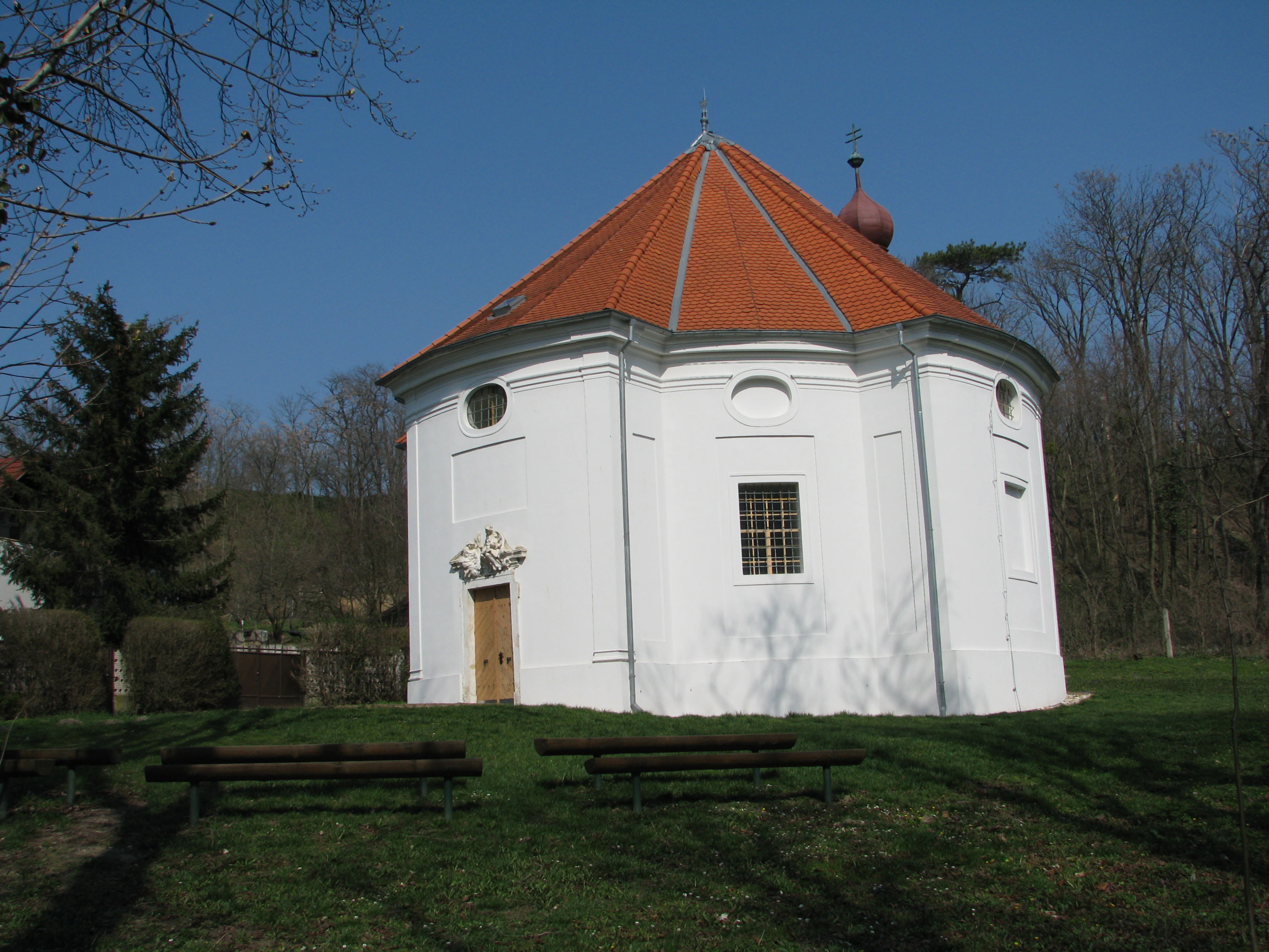 Kaplnka